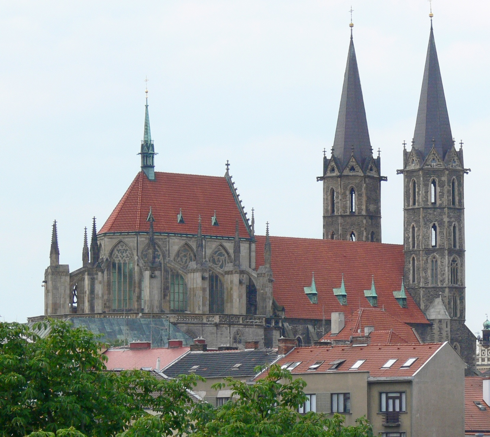 Kostel sv. Bartoloměje v Kolíně, oříznutá verze.